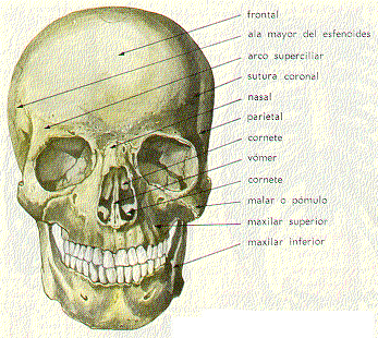 Huesos del cráneo